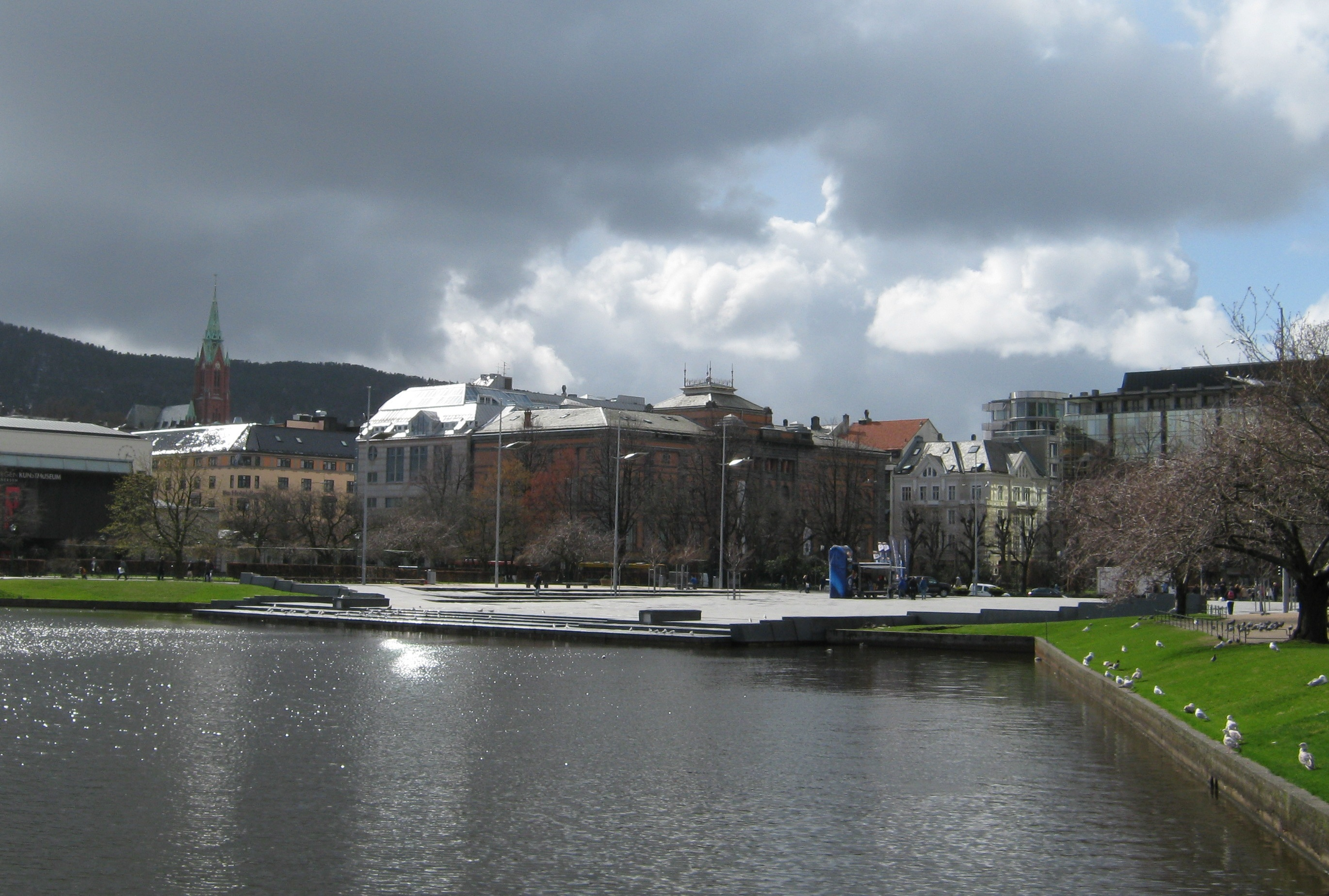 Festplassen i Bergen sentrum